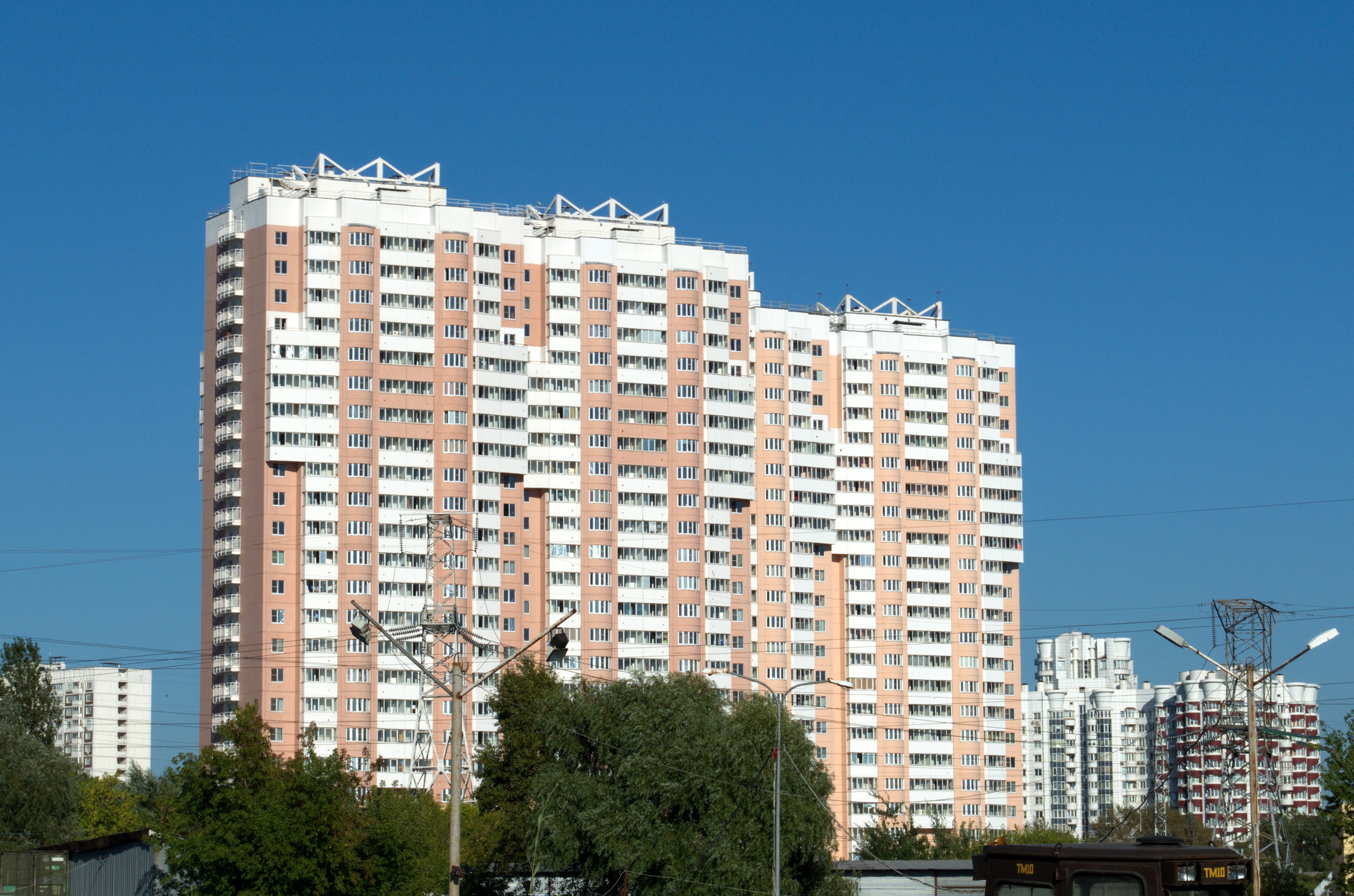 Общежития Национального исследовательского ядерного университета «МИФИ» на улице Москворечье (дом 2, корпуса 1 и 2).